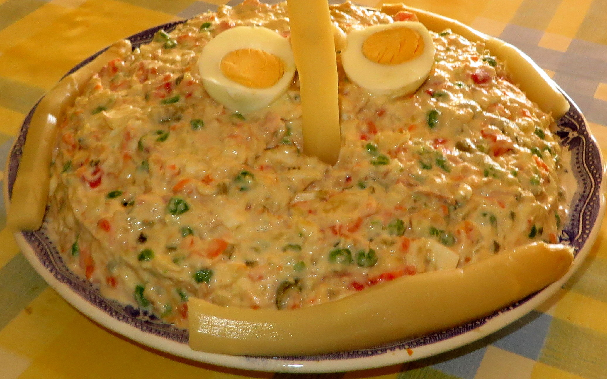 Ensaladilla rusa murciana